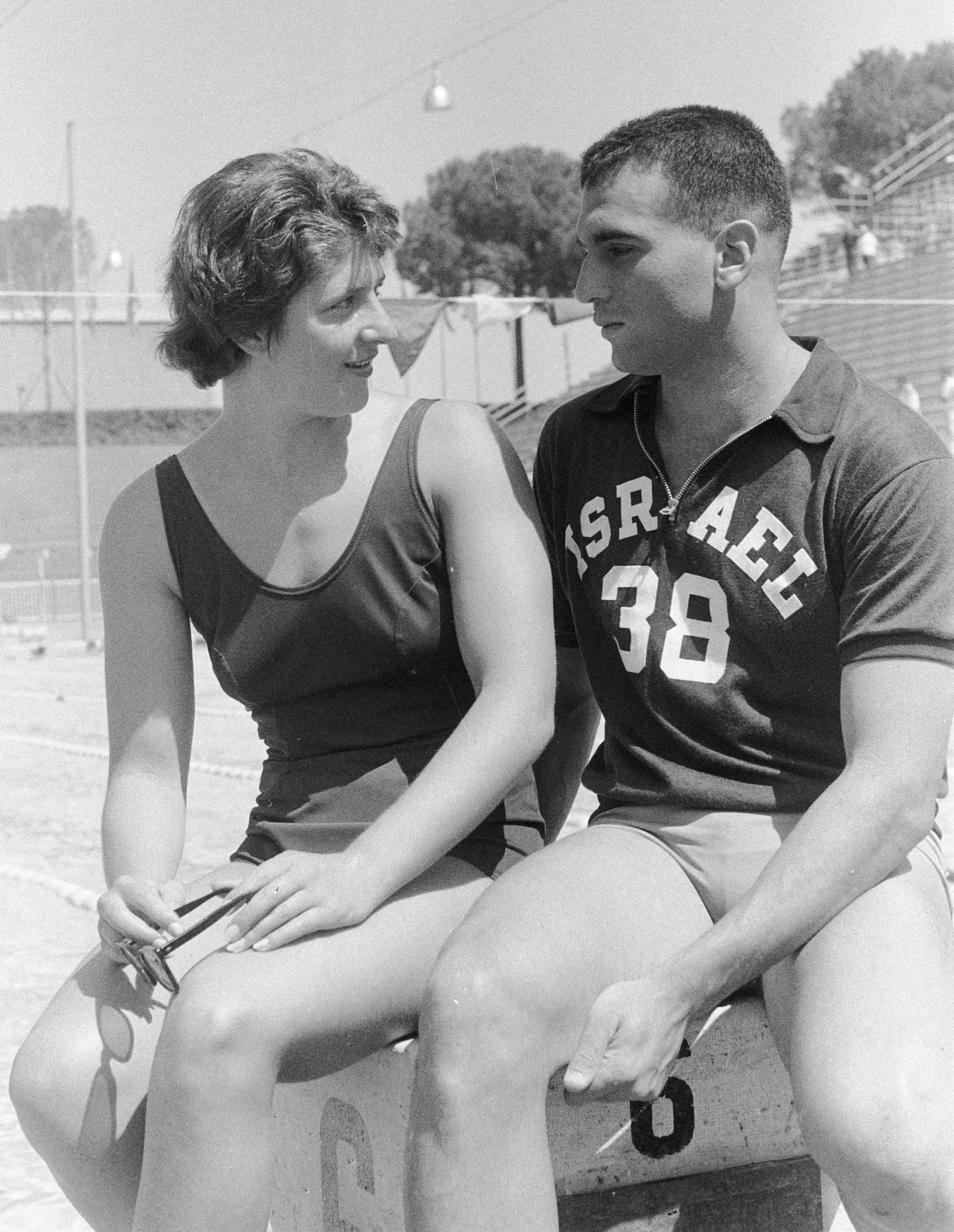 Dawn Fraser and Amiram Trauber, 1960 Olympics